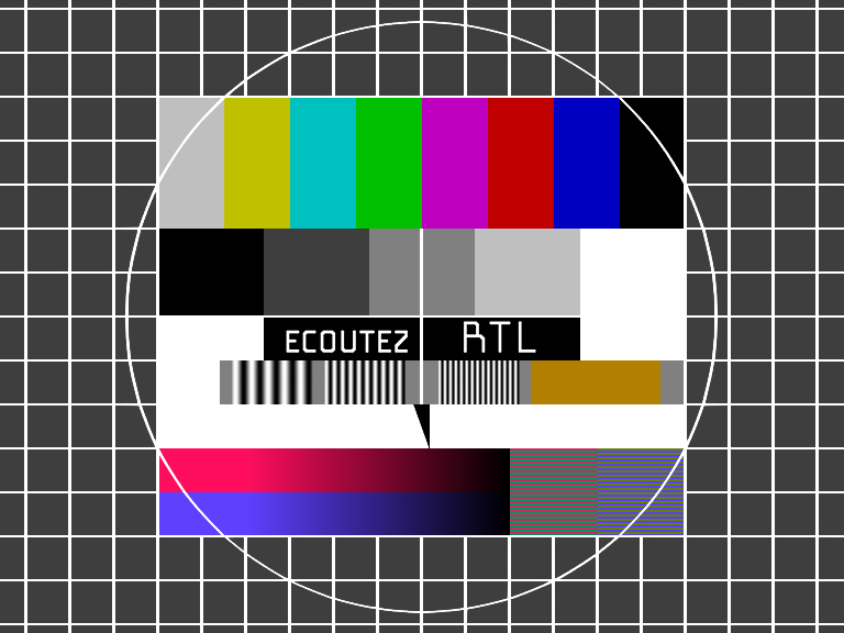 Mire RTL